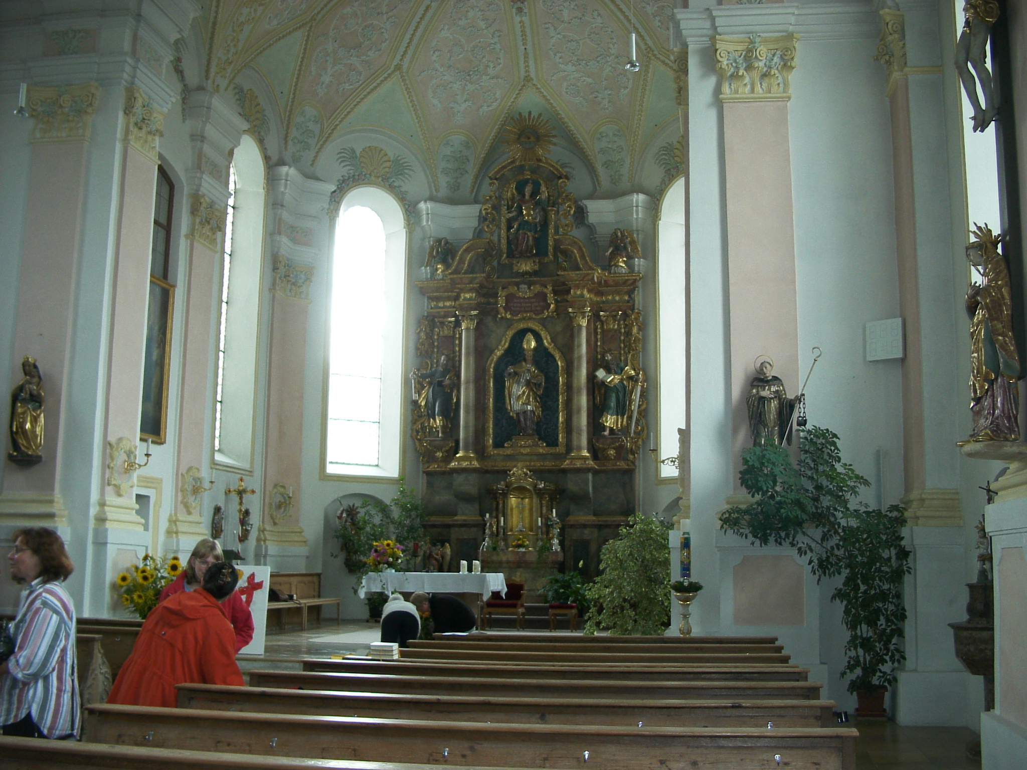 interno della chiesa parrocchialeThis is a photograph of an architectural monument.